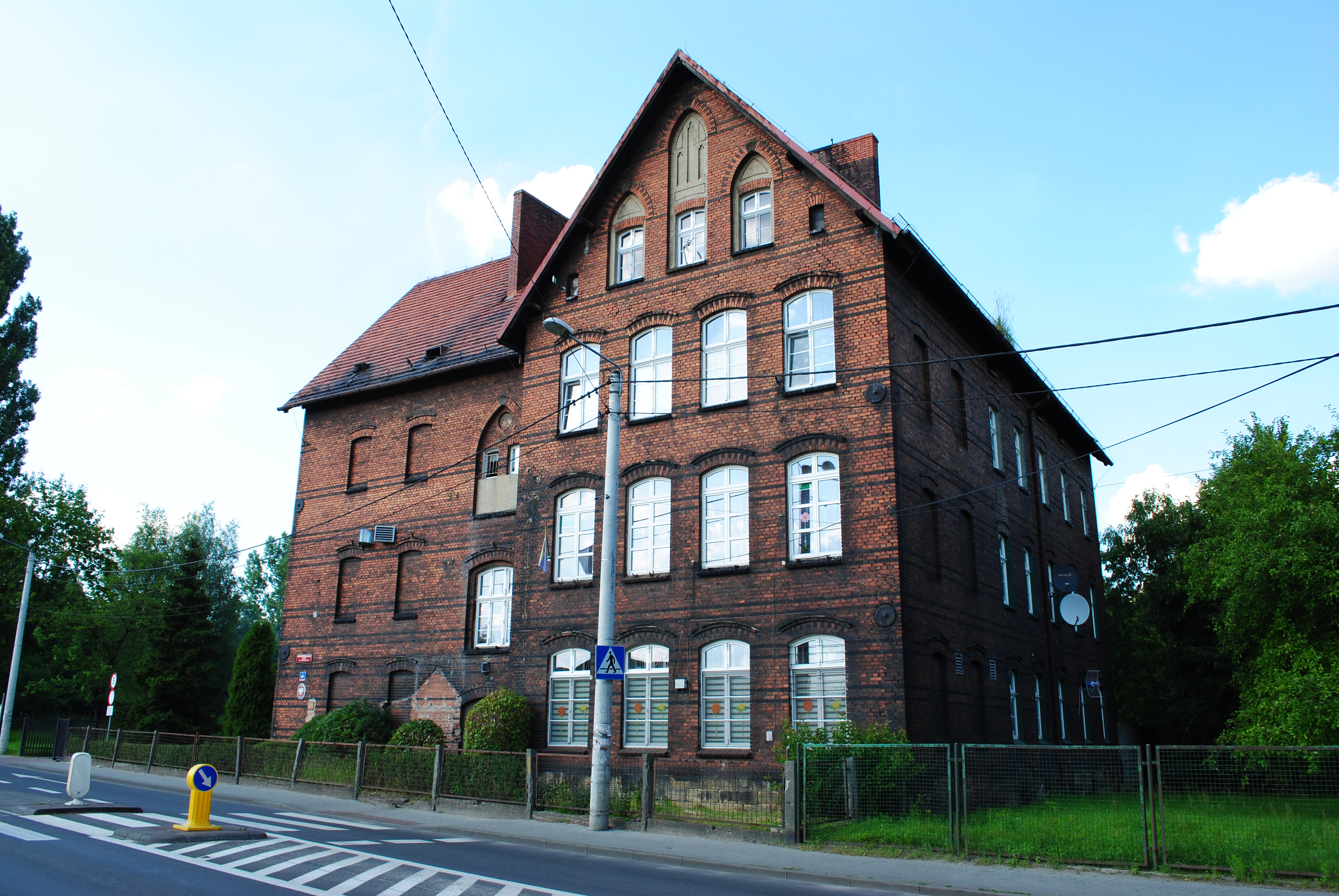 Katowice - Janów-Nikiszowiec. Miejskie Przedszkole nr 62